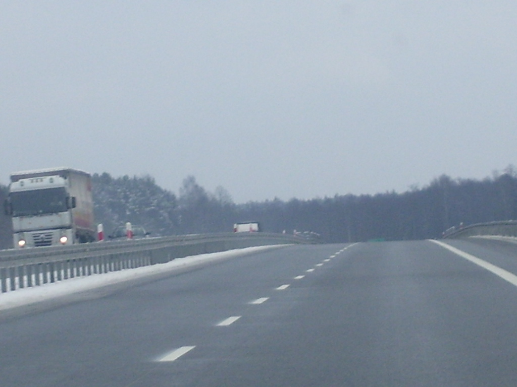 Obwodnica Wyszkowa